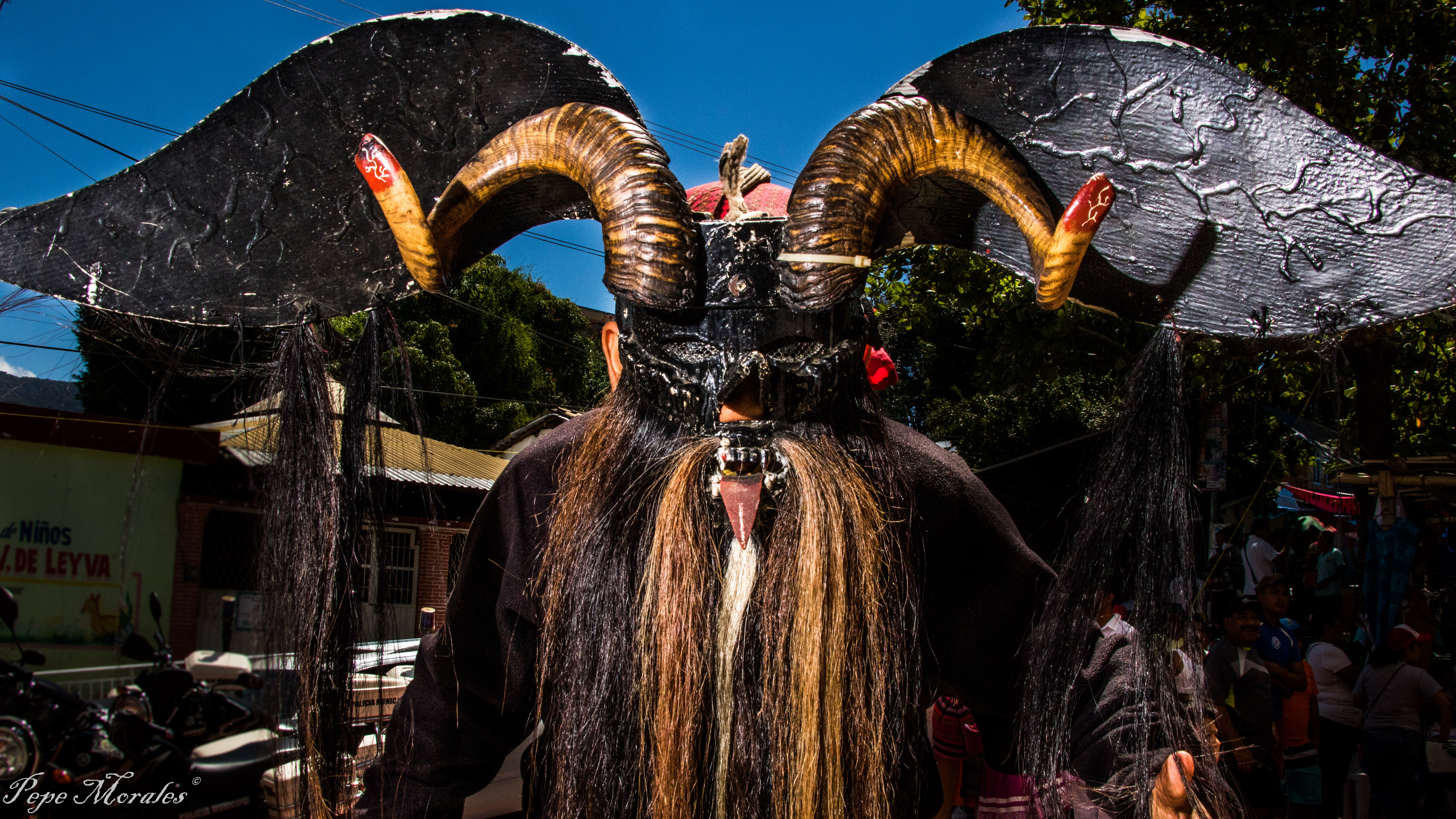 Danza tradicional de la Costa Chica de Guerrero y Oaxaca. Los Diablos. Ayutla de los Libres, Gue.